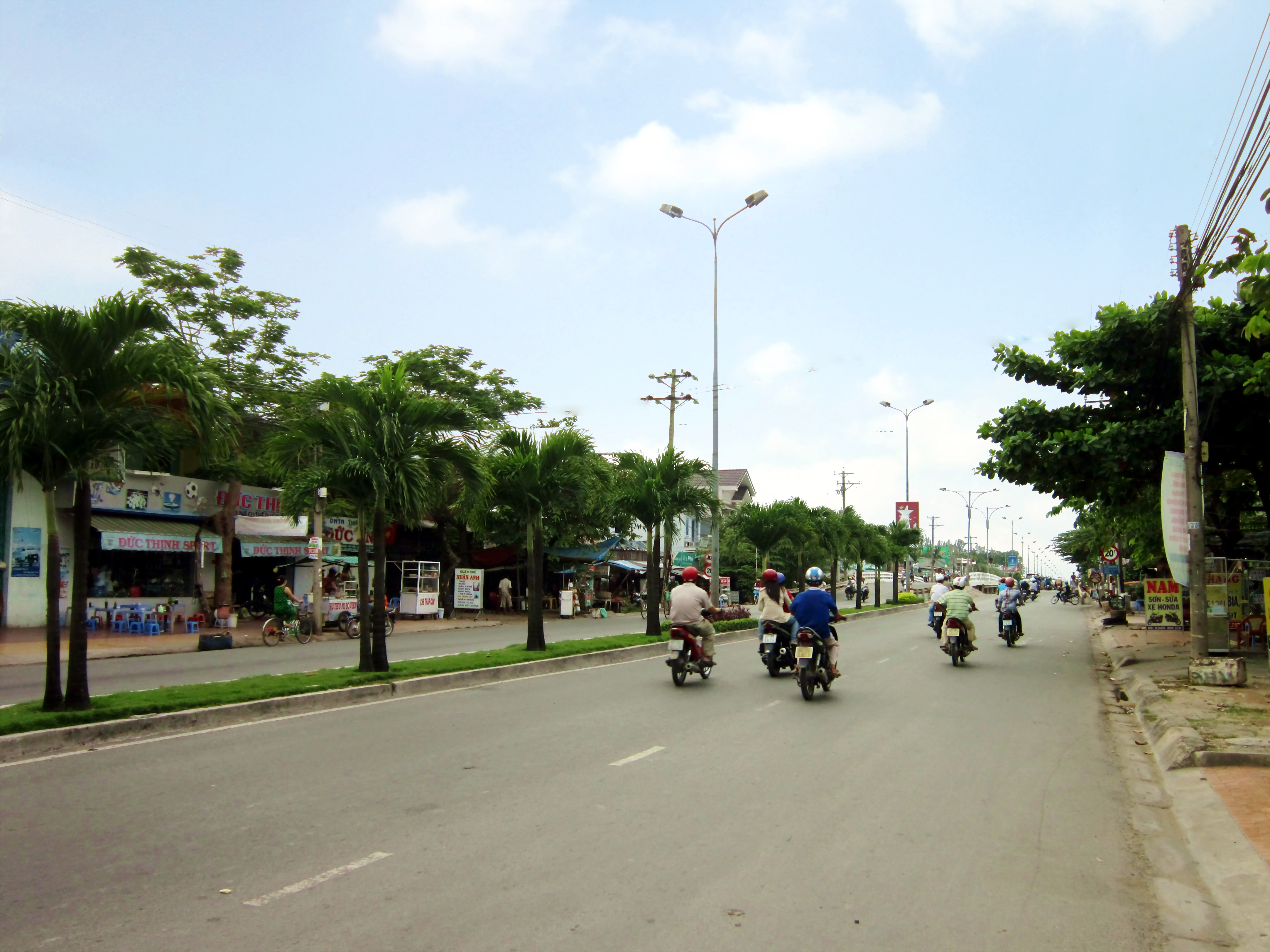 Quốc lộ 91, đoạn gần cầu Rạch Gòi Bé, thuộc phường Mỹ Thới, thành phố Long Xuyên, tỉnh An Giang, Việt Nam.